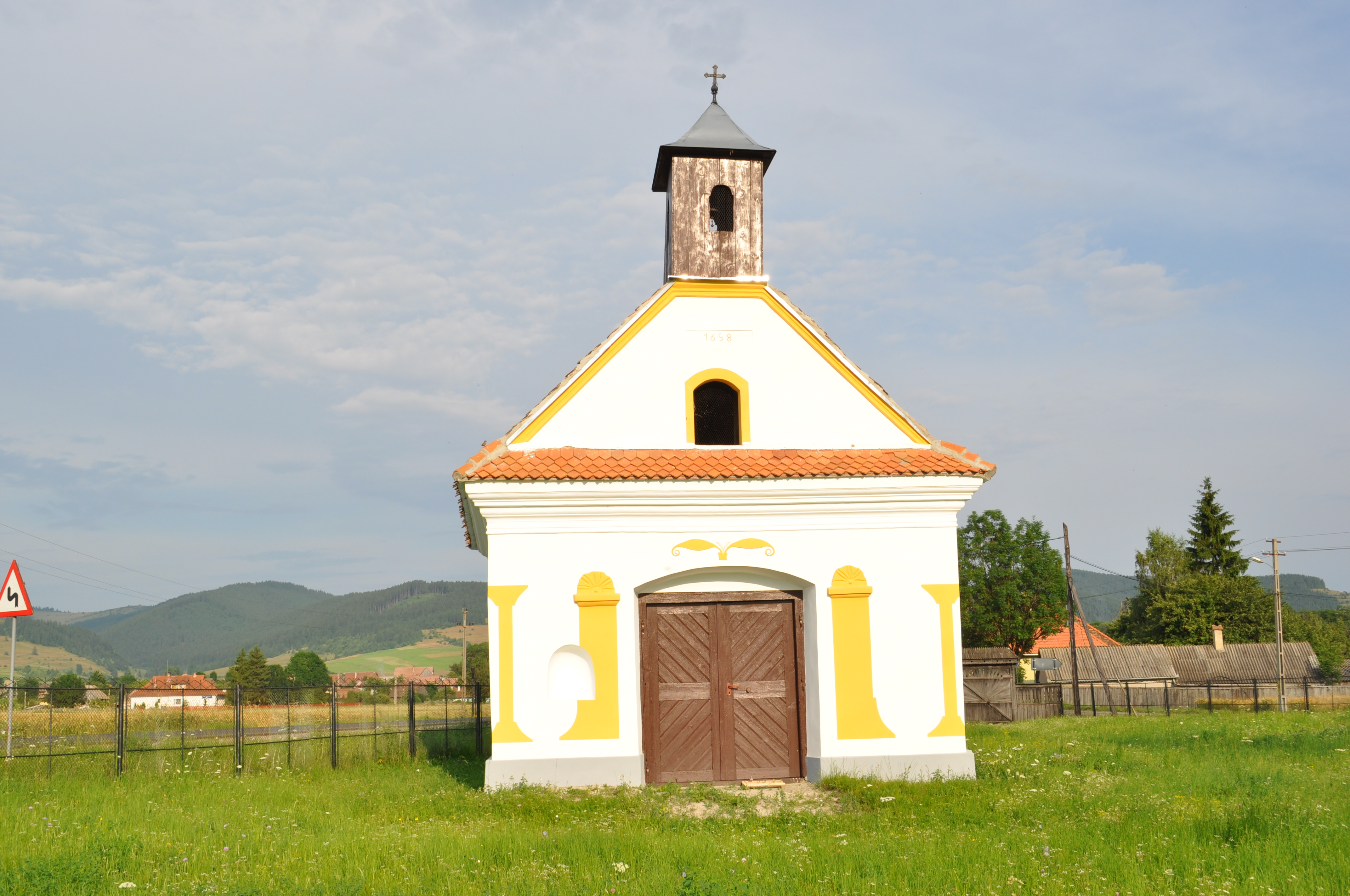 Sânmartin, Harghita